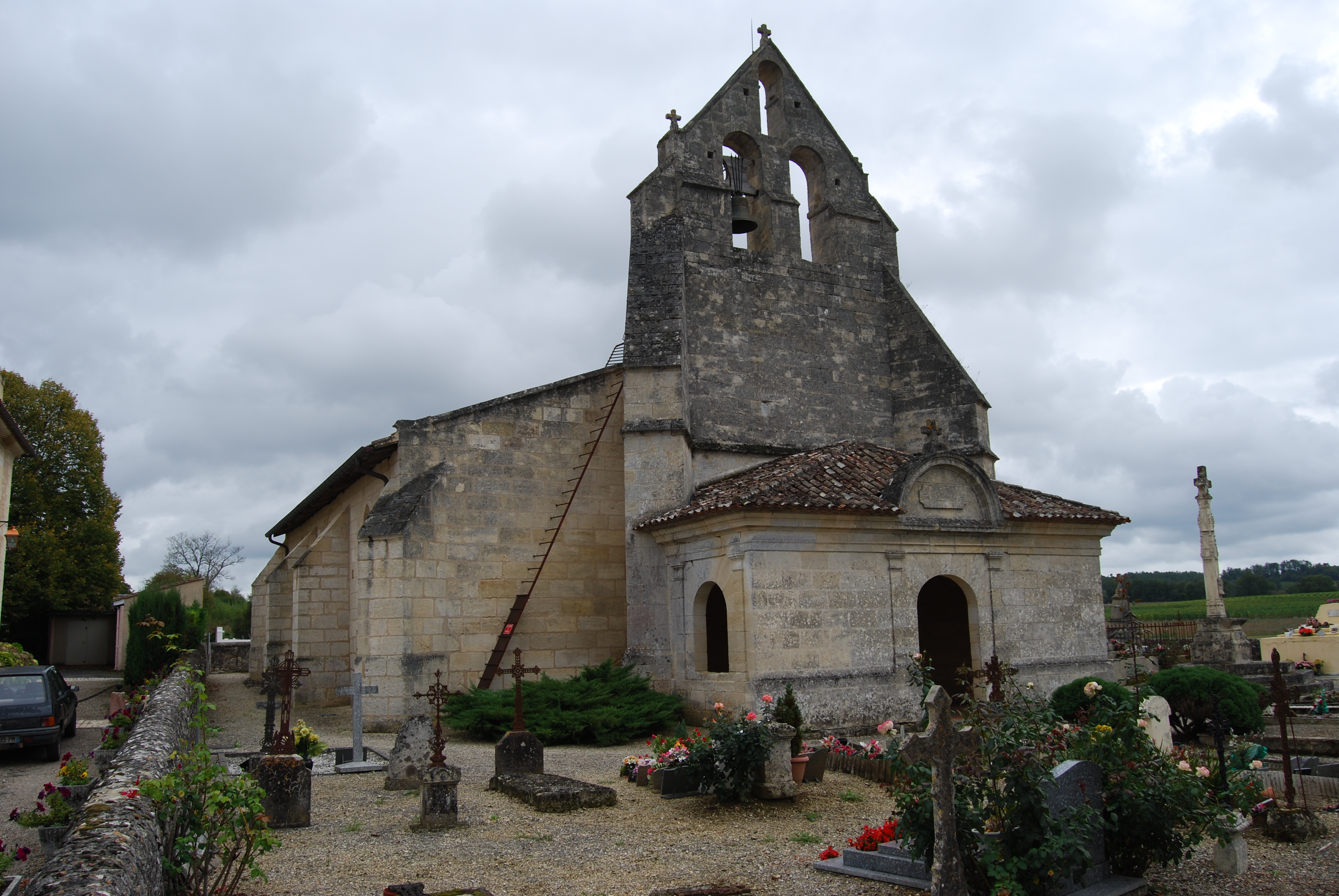 Église Saint-Roch de Blésignac, (Inscrit, 2001) .